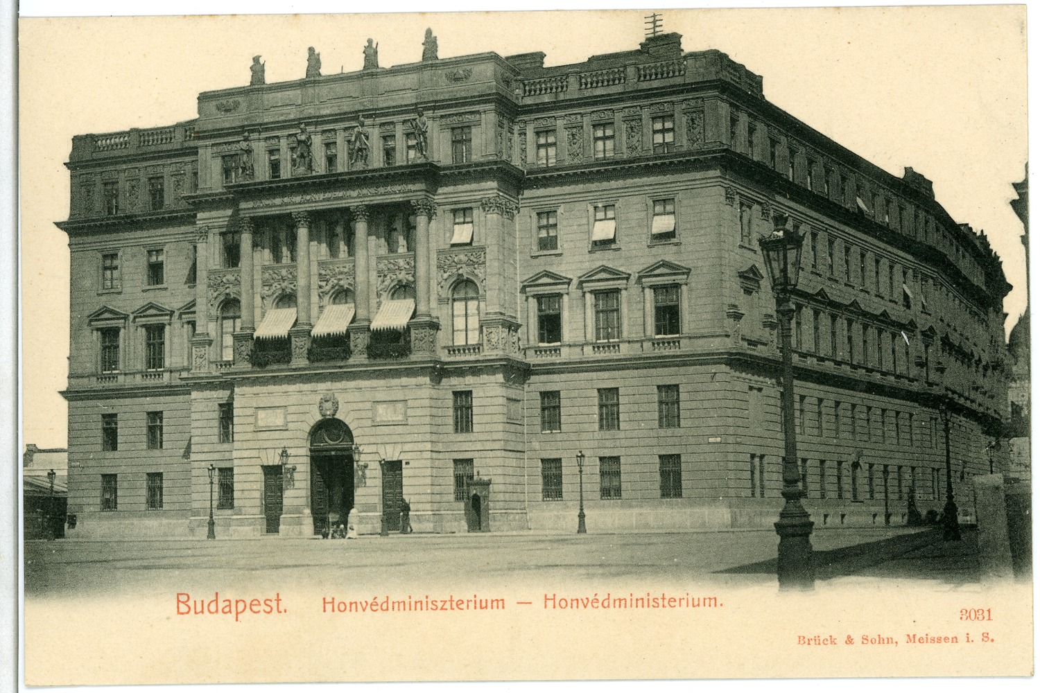 Budapest; Honvedministerium